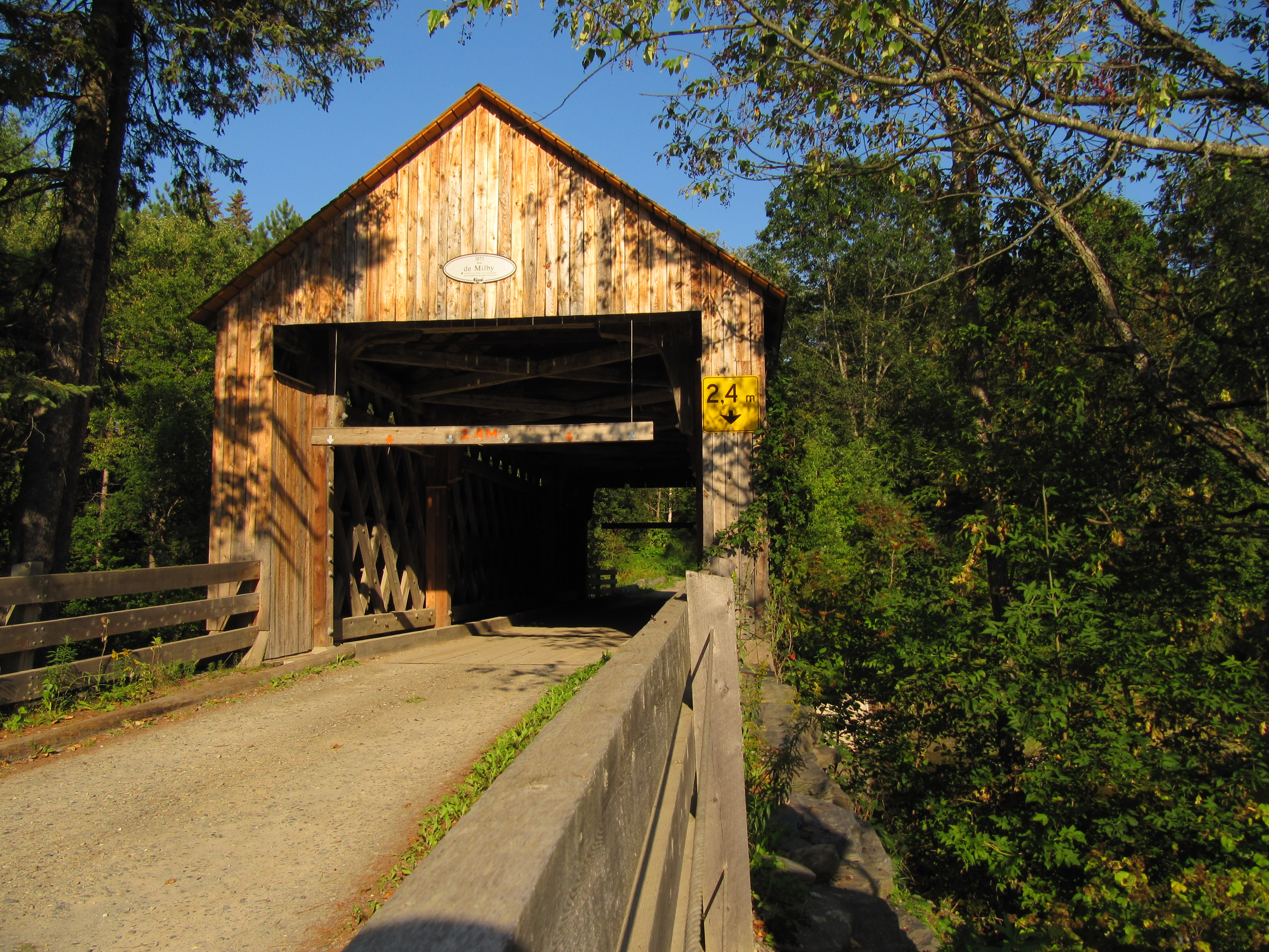 Pont de Milby, Waterville, QC - Vue de face